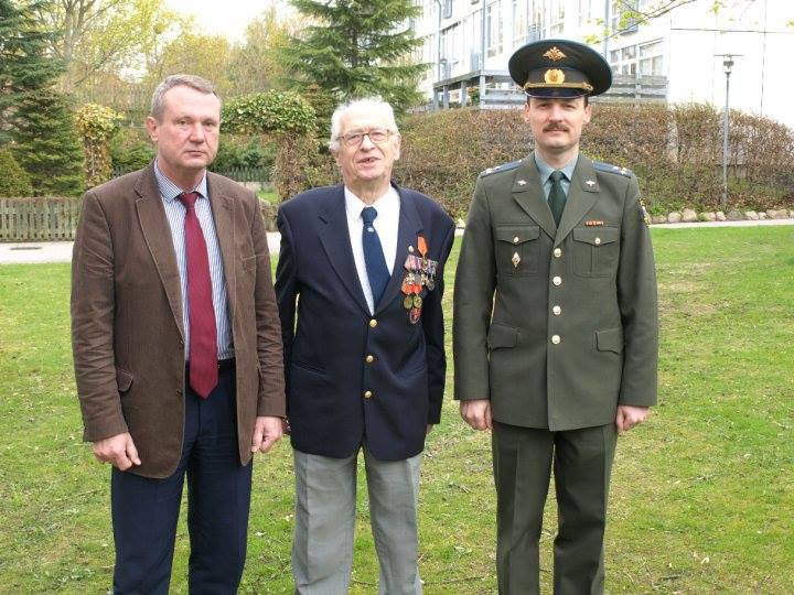 Erik Aarestrup da han modtager sin sidste hædersbevisning fra den russiske stat. Det er Erik Aarestrup i midten. Fotograferet ved hans bopæl på Rytterbakken i Helsingør.